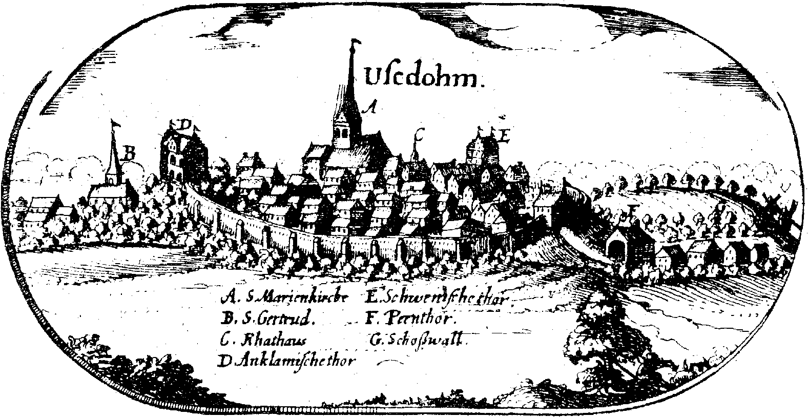 Ansicht der Stadt Usedom (zwischen 1614 und 1617)